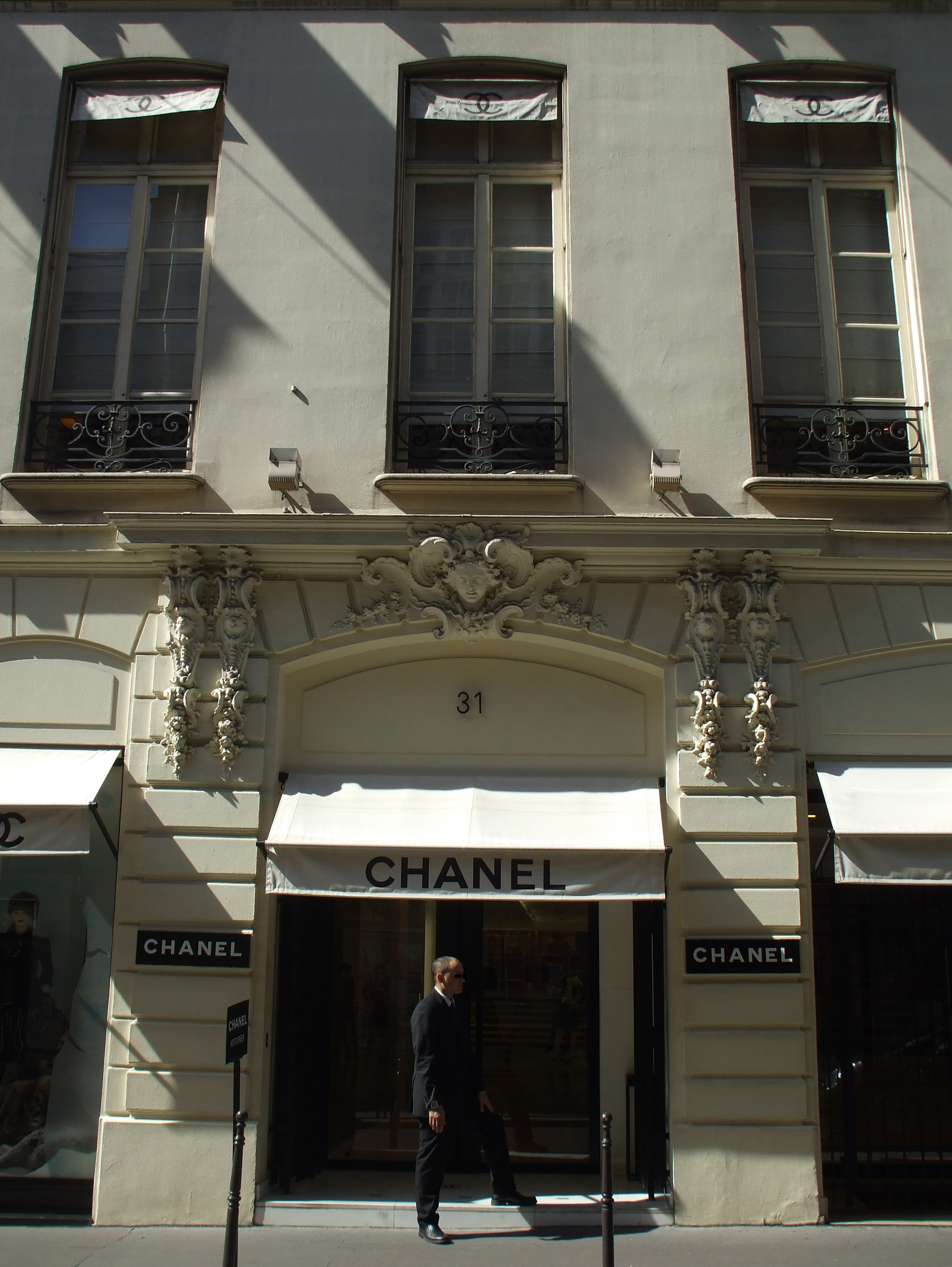 Ancien appartement de Coco Chanel